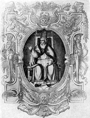 Pope Clement II